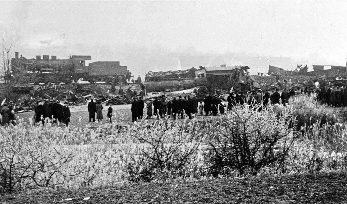 Über 100 Menschen kamen am 22. Dezember 1939 beim Zugunglück bei Markdorf in Baden ums Leben.